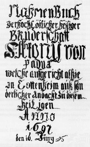 Titelblatt des Mitgliederverzeichnis der St.-Antonius-Bruderschaft zu Kottenheim von 1697